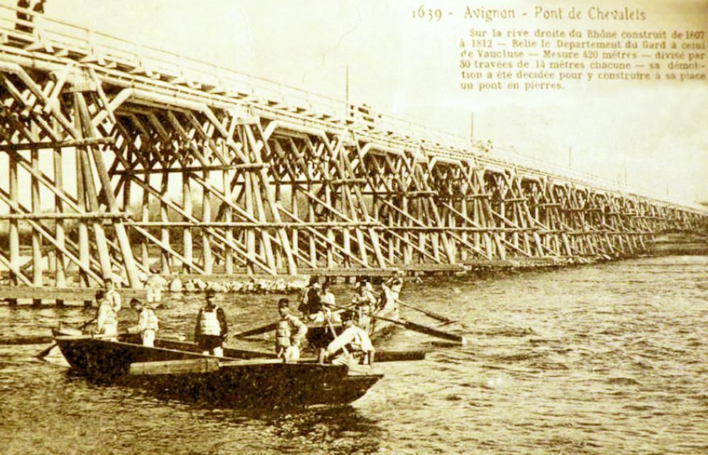 Pont de bois Avignon Villeneuve entretenu par les pontonniers de 7e génie d'Avignon